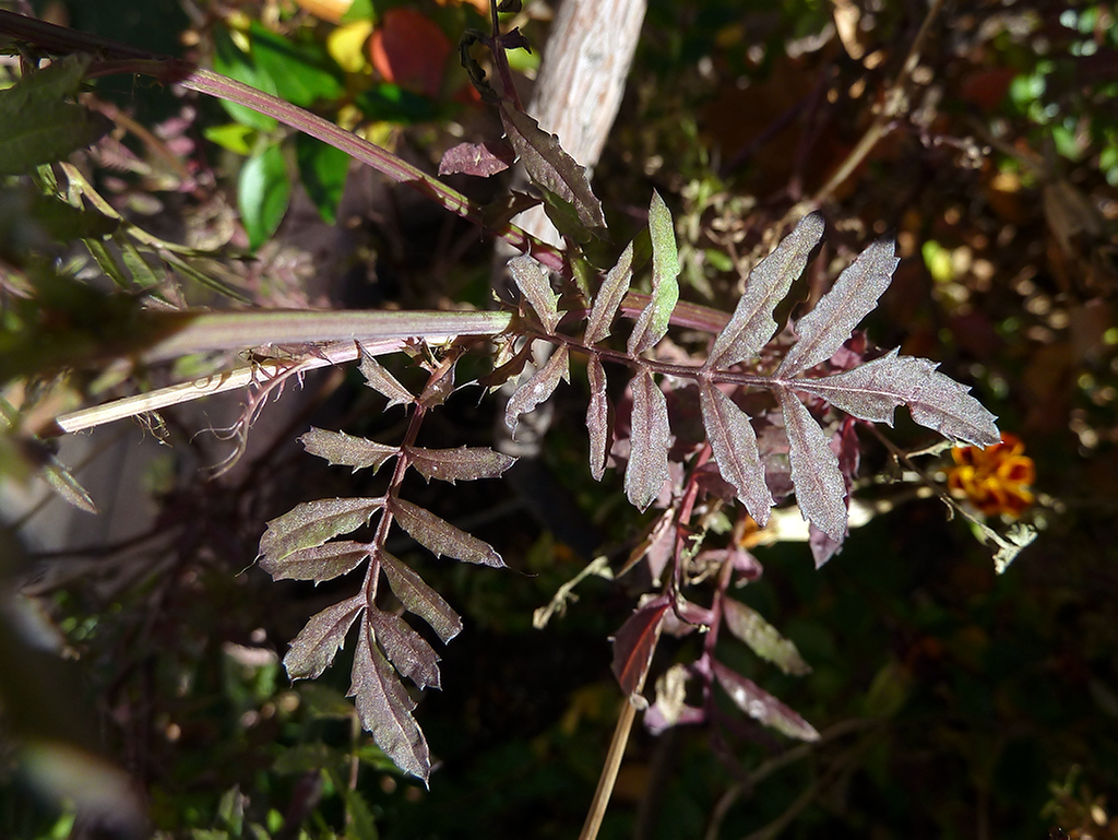 Tagetes erecta (Clavelón de la India, cempasúchil, ...): Hojas pinnaticompuestas (imparipinnadas) - Ornamental, Calle Goya, Madrid (España).